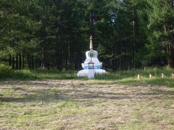 субурган